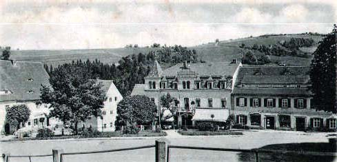 Lauenstein (Sachsen) Marktplatz um 1907